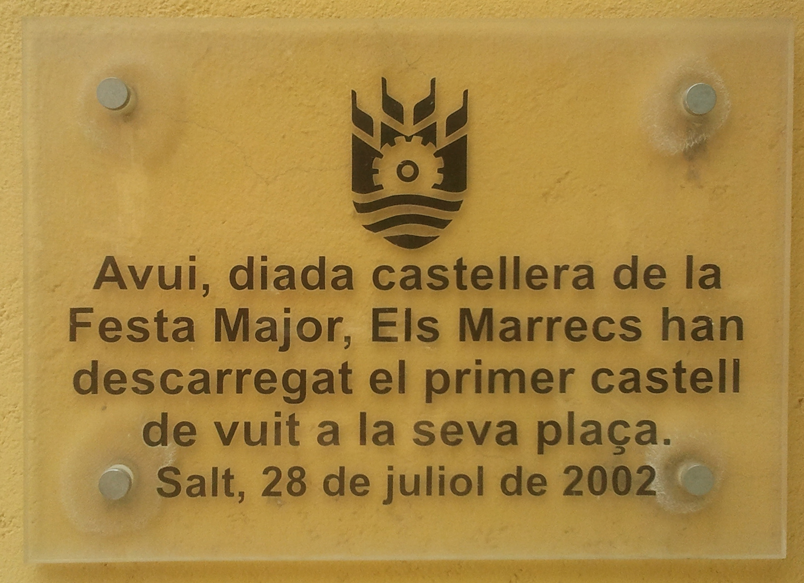 Placa dedicada als Marrecs de Salt a la plaça Lluís Companys, a l'Ajuntament de Salt per commemorar el primer castell de vuit a la població, el 2002